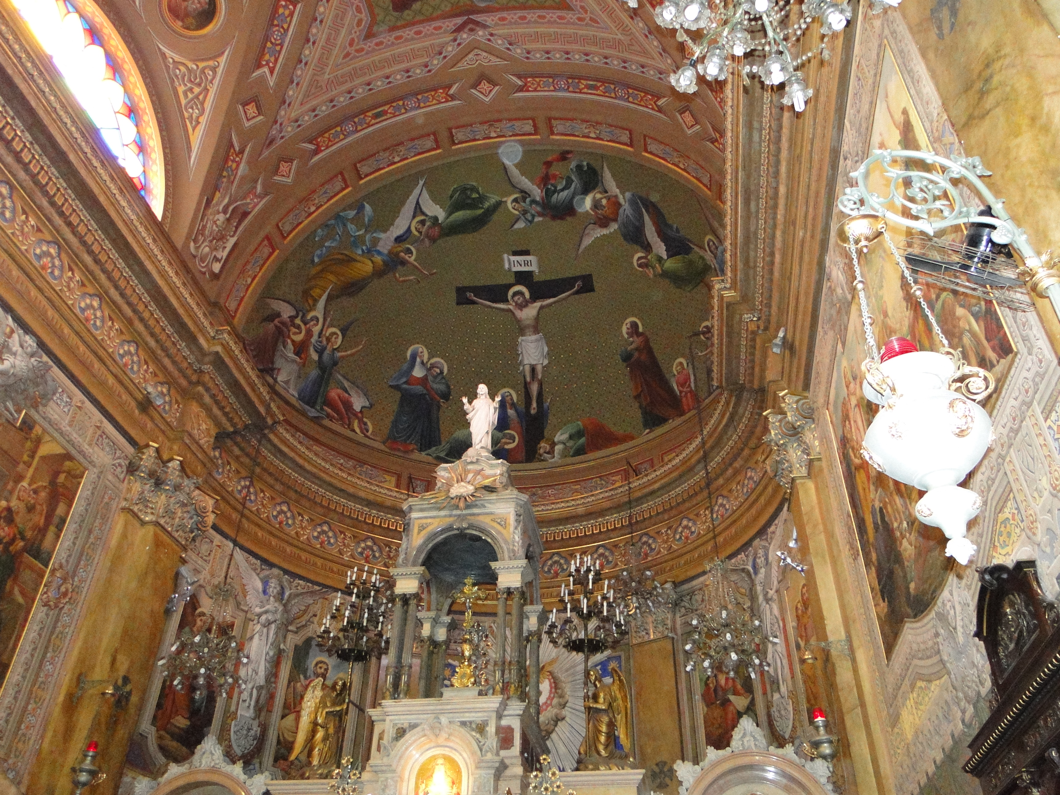 Imagens e quadros que ornam o altar-mór do Santuário do Sagrado Coração de Jesus, em São Paulo (SP), Brasil.